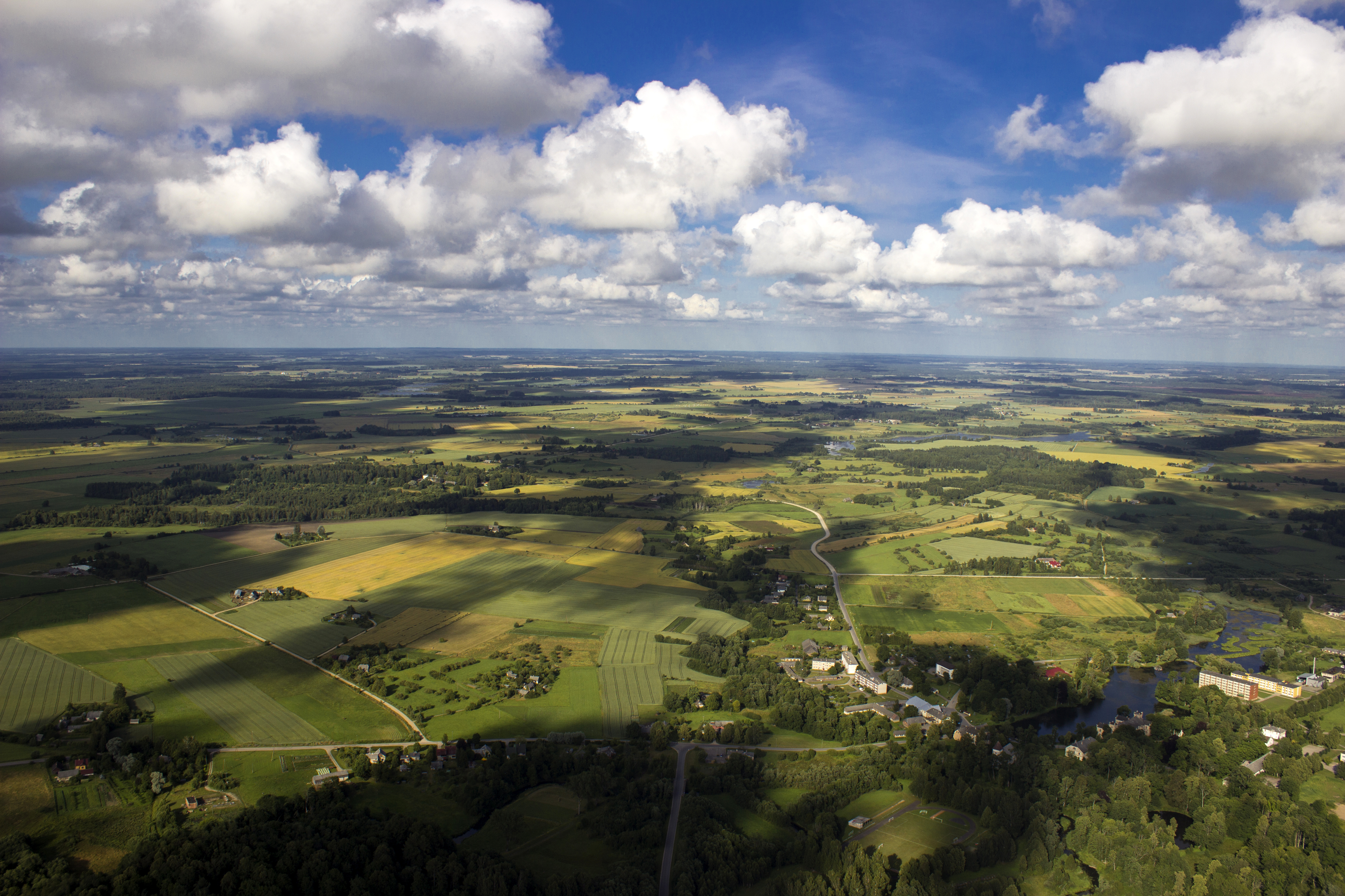 Cīrava